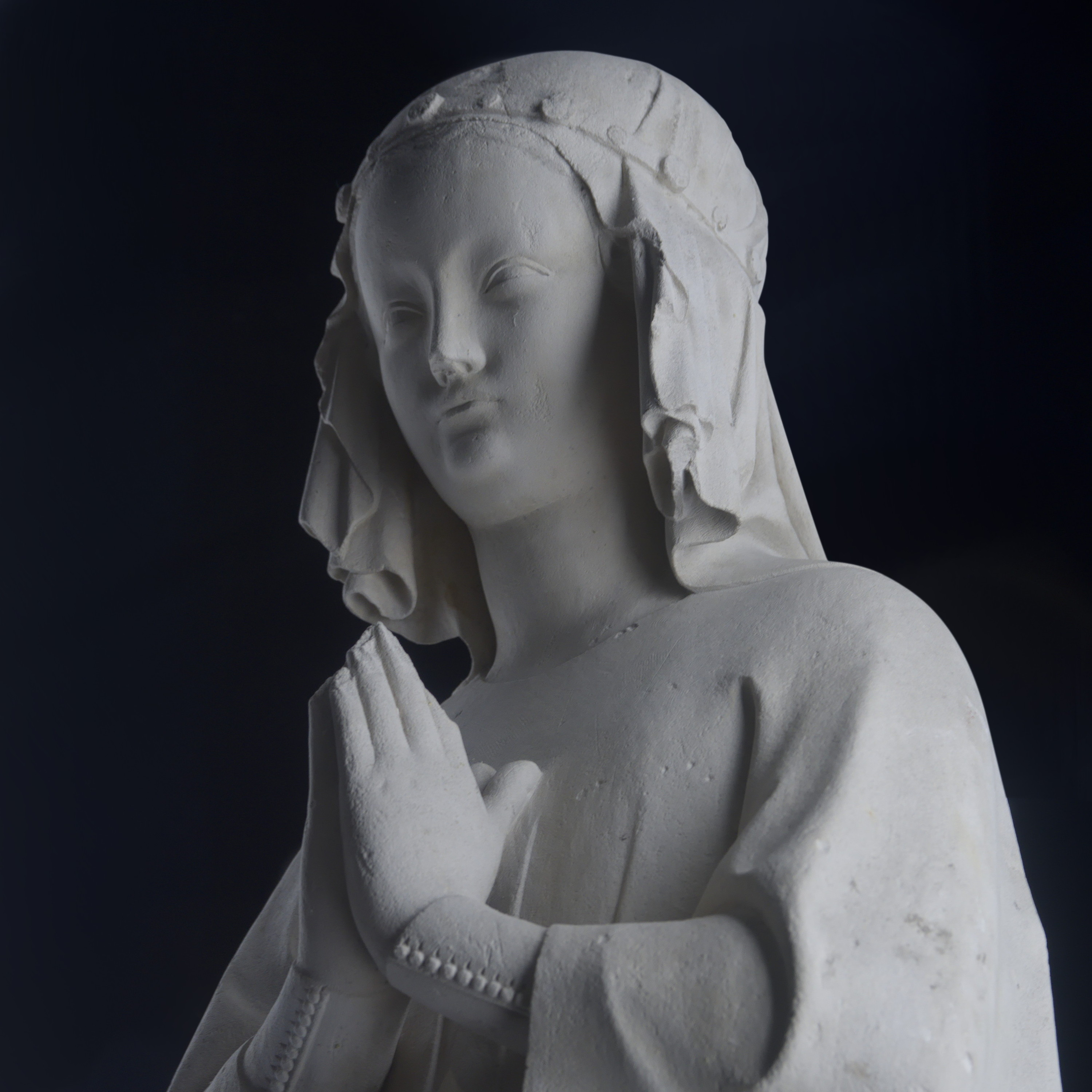 Statue en pierre représentant Isabelle de France (1295-1358), fille du roi Saint-Louis, réalisée en Île de France vers 1300. Historique : Poissy, église du prieuré Saint-Louis ; transférée à la collégiale de Poissy. Classée Monument Historique en 1930. Actuellement à Poissy, collégiale Notre-Dame. Cliché réalisé le 29/12/2014 à l'exposition Saint-Louis à la Conciergerie (Paris).